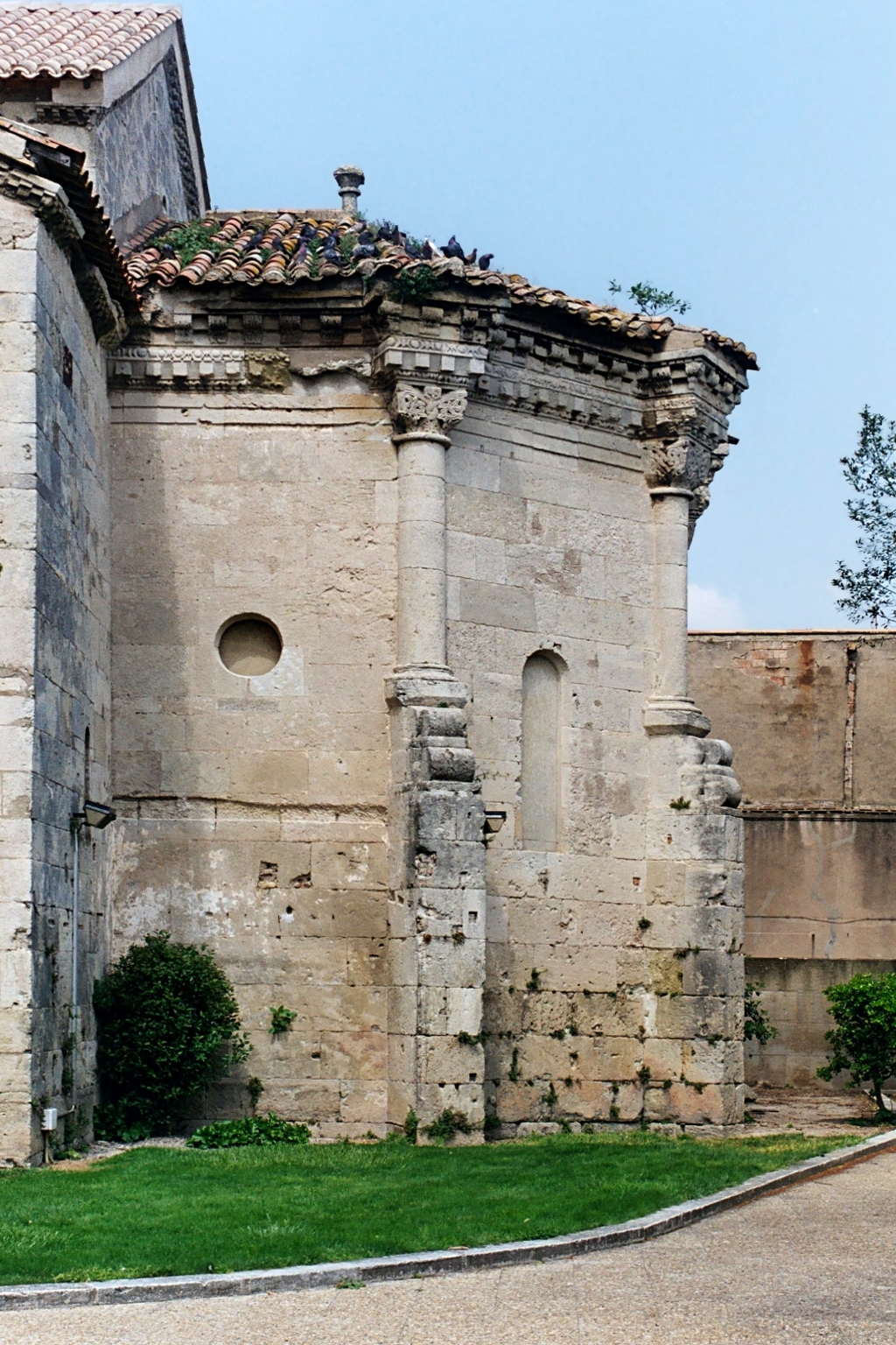 France - Languedoc - Hérault - Église Saint-Jacques de Béziers